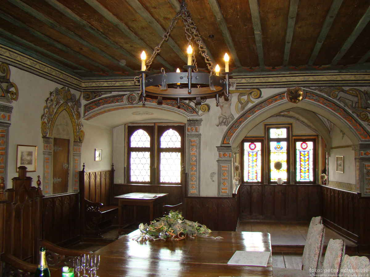 Rittersaal im Alten Schloss in Neckarbischofsheim